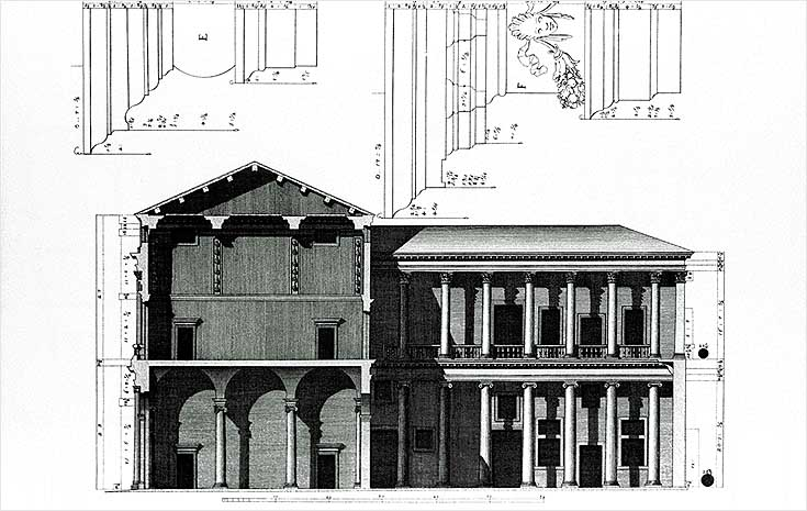 Palazzo Barbaran da Porto di Andrea Palladio. Disegno da Ottavio Bertotti Scamozzi, 1776